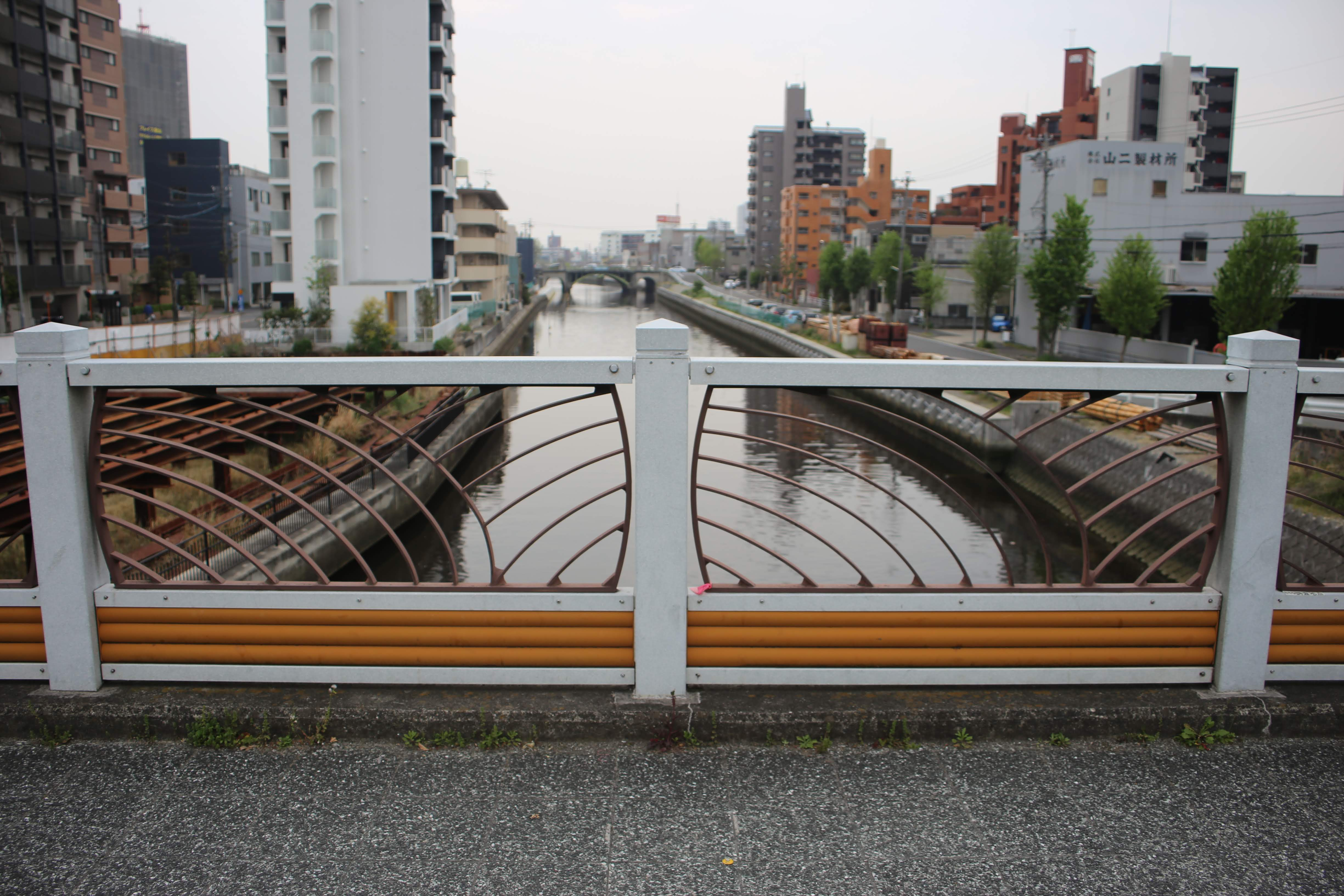 名古屋市堀川に架かる尾頭橋